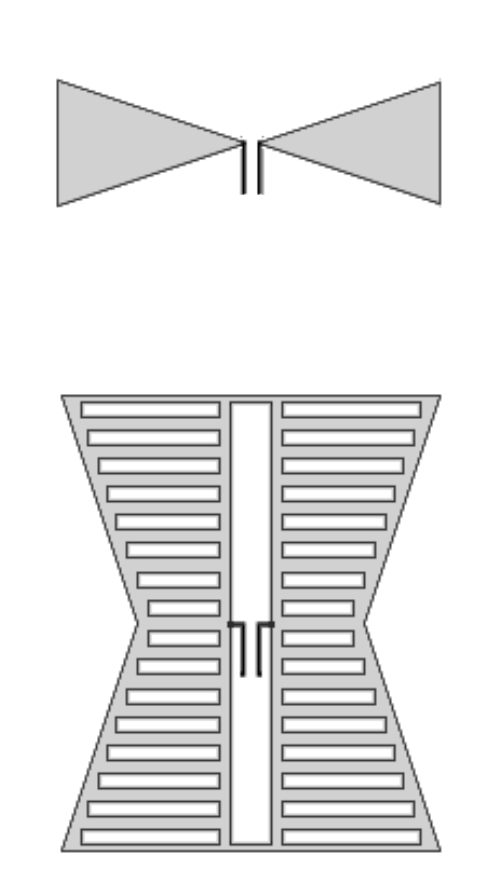 Entstehungsgang einer Batwing-Antenne aus einem Spreizdipol